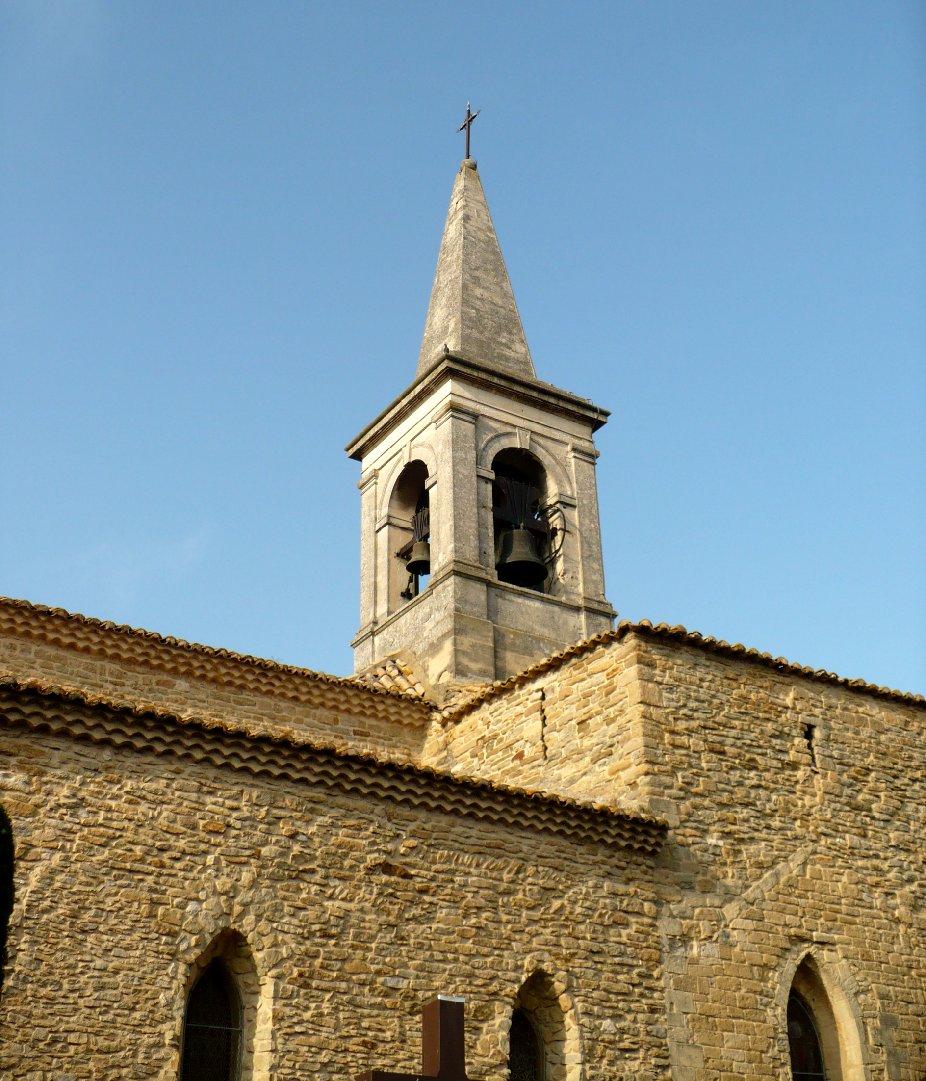 L'Eglise de Connaux